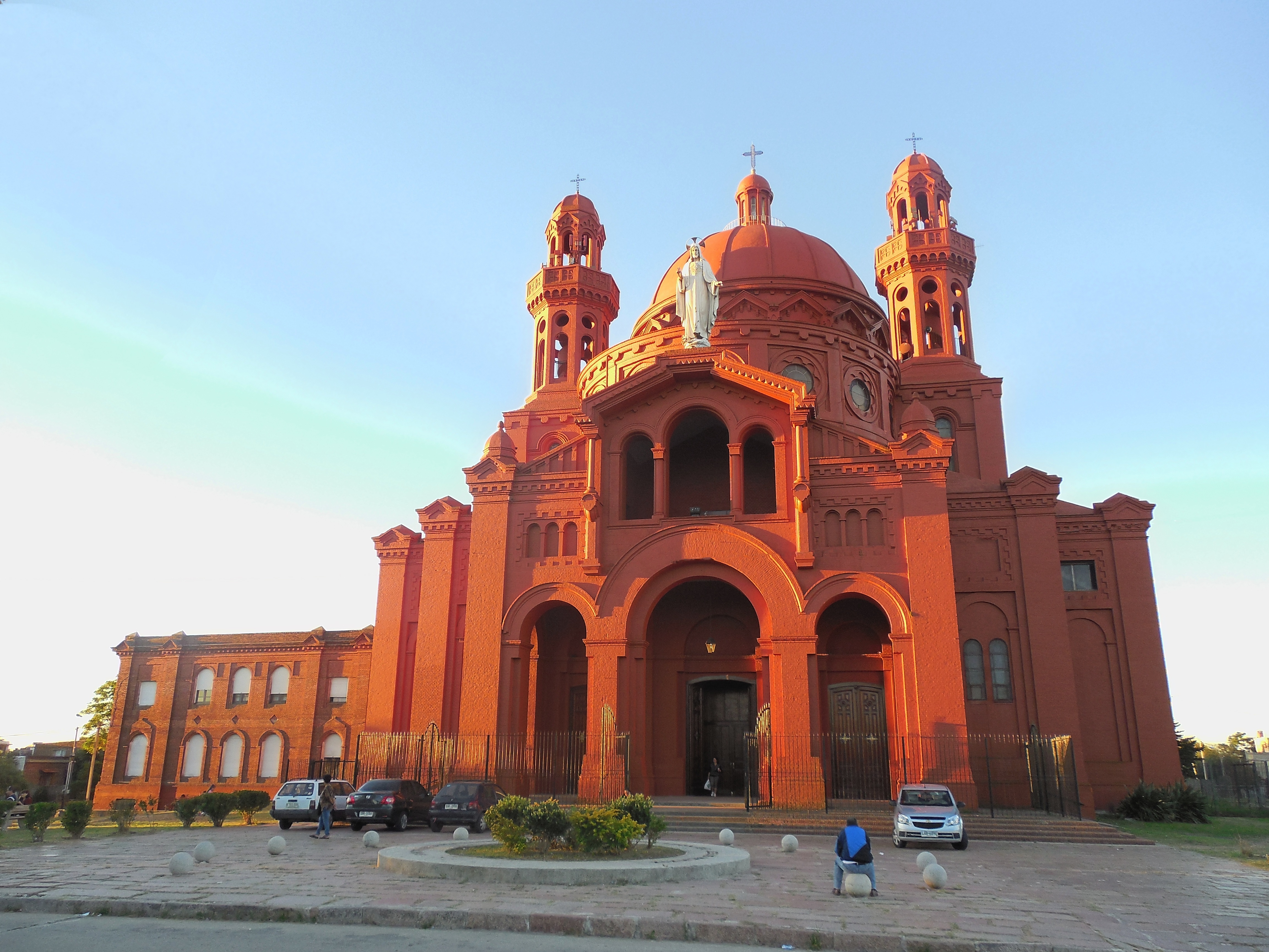 Santuario Nacional del Sagrado Corazón de Jesús ubicado en el barrio "Cerrito de la Victoria"